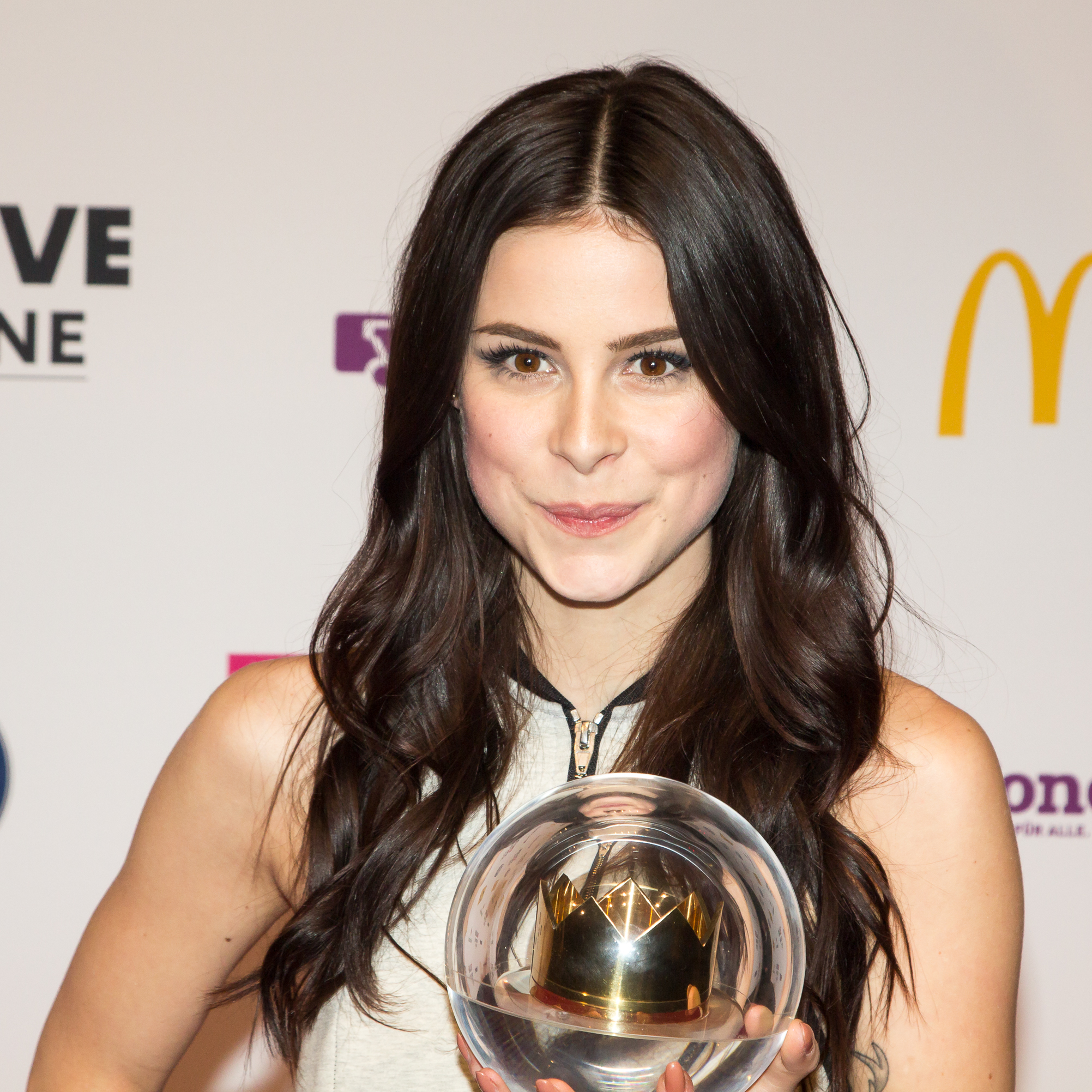 1lIVE Krone 2015 - Lena Meyer-Landrut